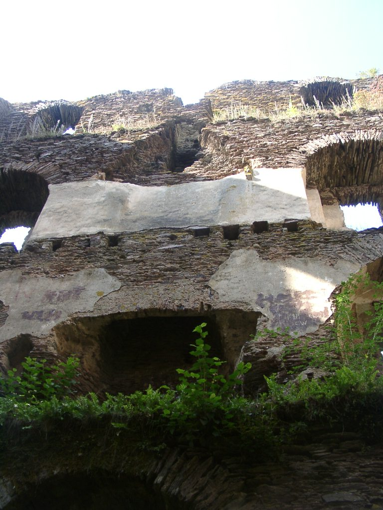 Balduinseck Innenverputz / plaster inside